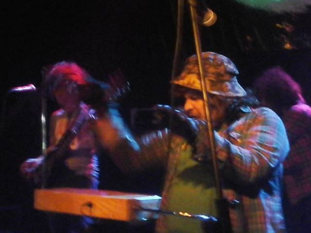 La banda argentina Massacre, dando un concierto en Mendoza.